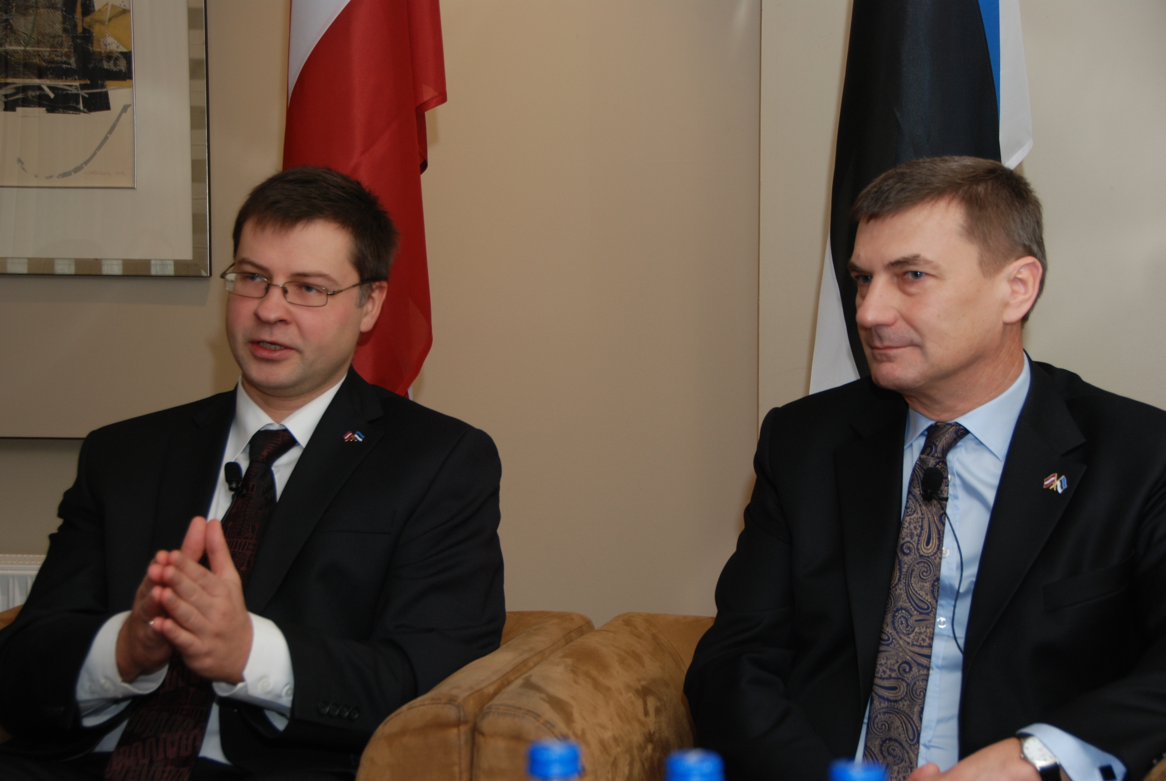 Latvijas Republikas Ministru prezidents Valdis Dombrovskis un Igaunijas Republikas premjerministrs Andrus Ansips atklājot Latvijas un Igaunijas sadarbības ziņojuma ieviešanas konferenci Foto: Aivis Freidenfelds, Valsts kanceleja